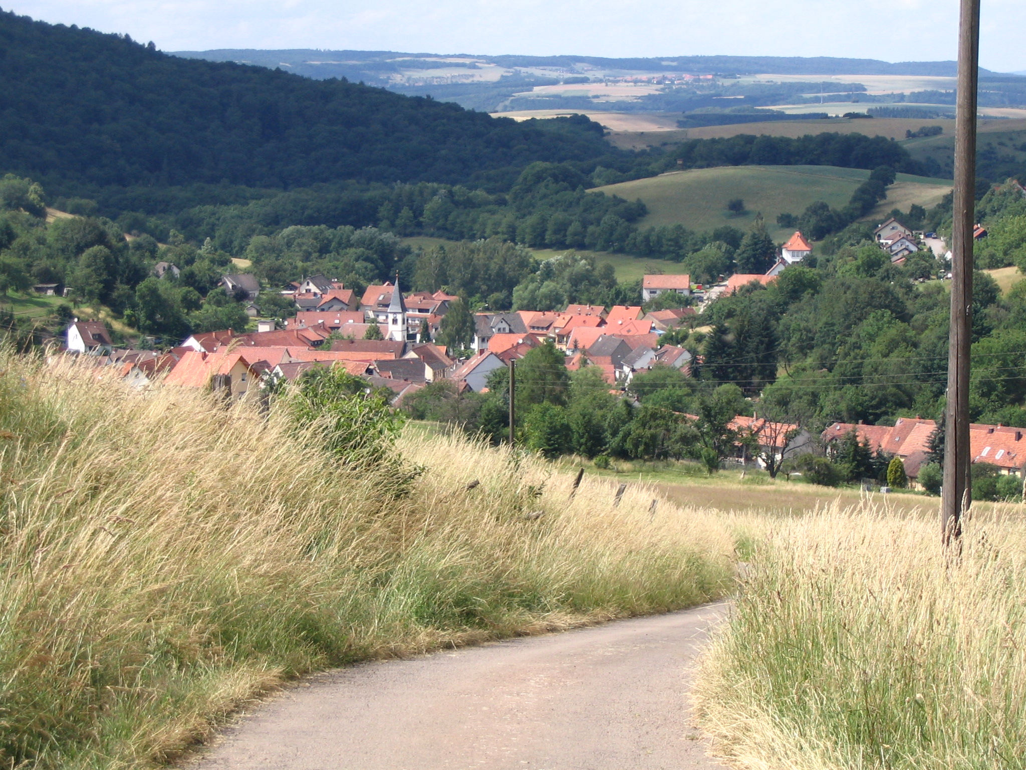 Ortsmitte von Eßweiler